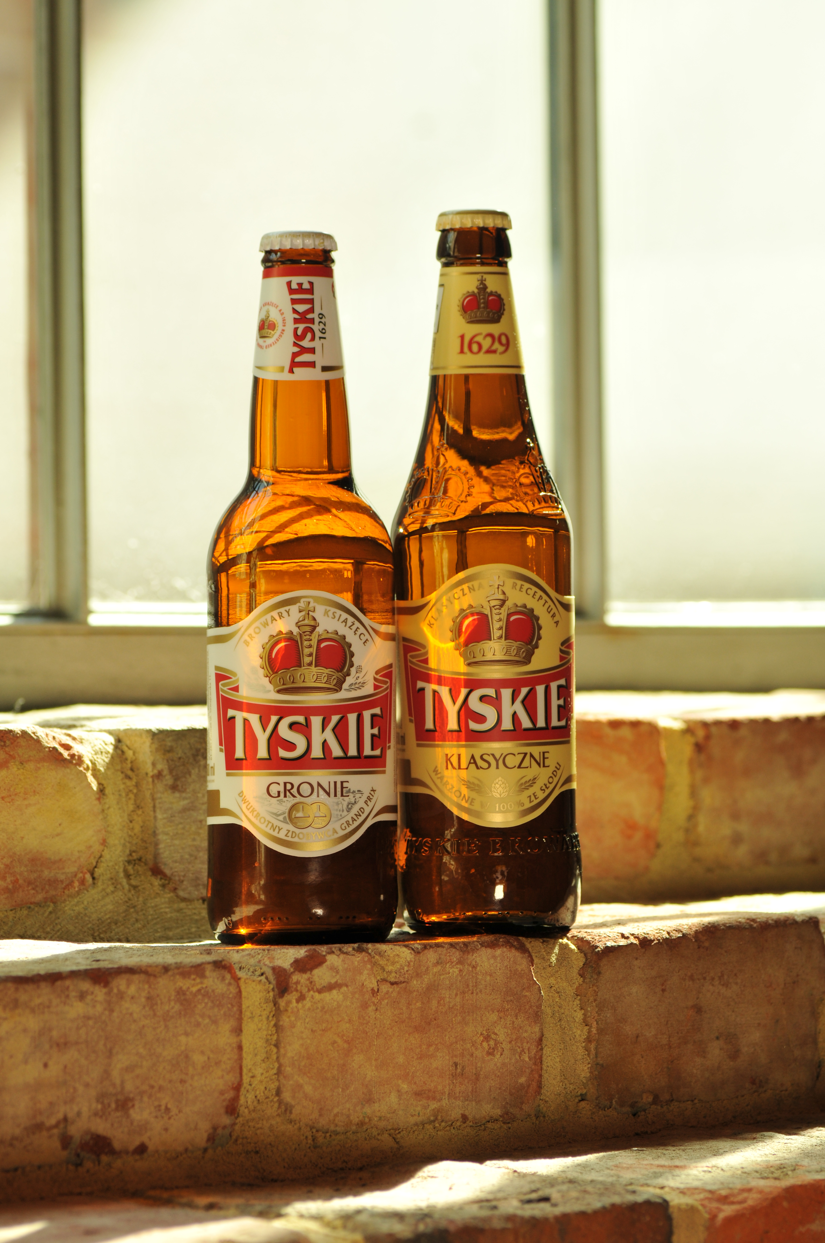 Tyskie Gronie i Tyskie Klasyczne